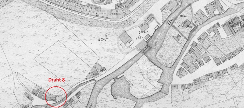 Umgebung am Draht bei Pfaffenofen an der Ilm auf dem Stadtplan der Bayerischen Uraufnahme 1810.